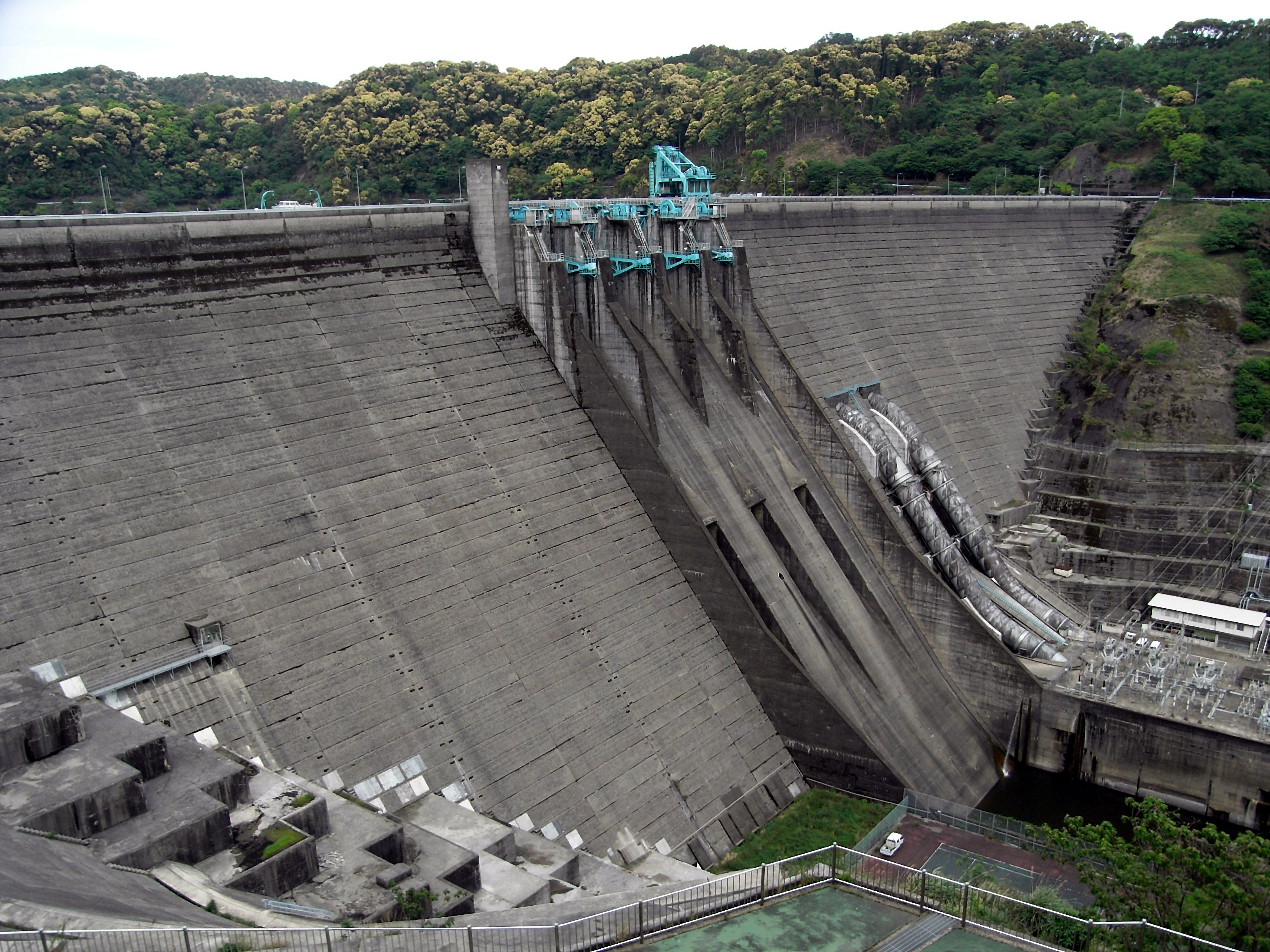 Dam